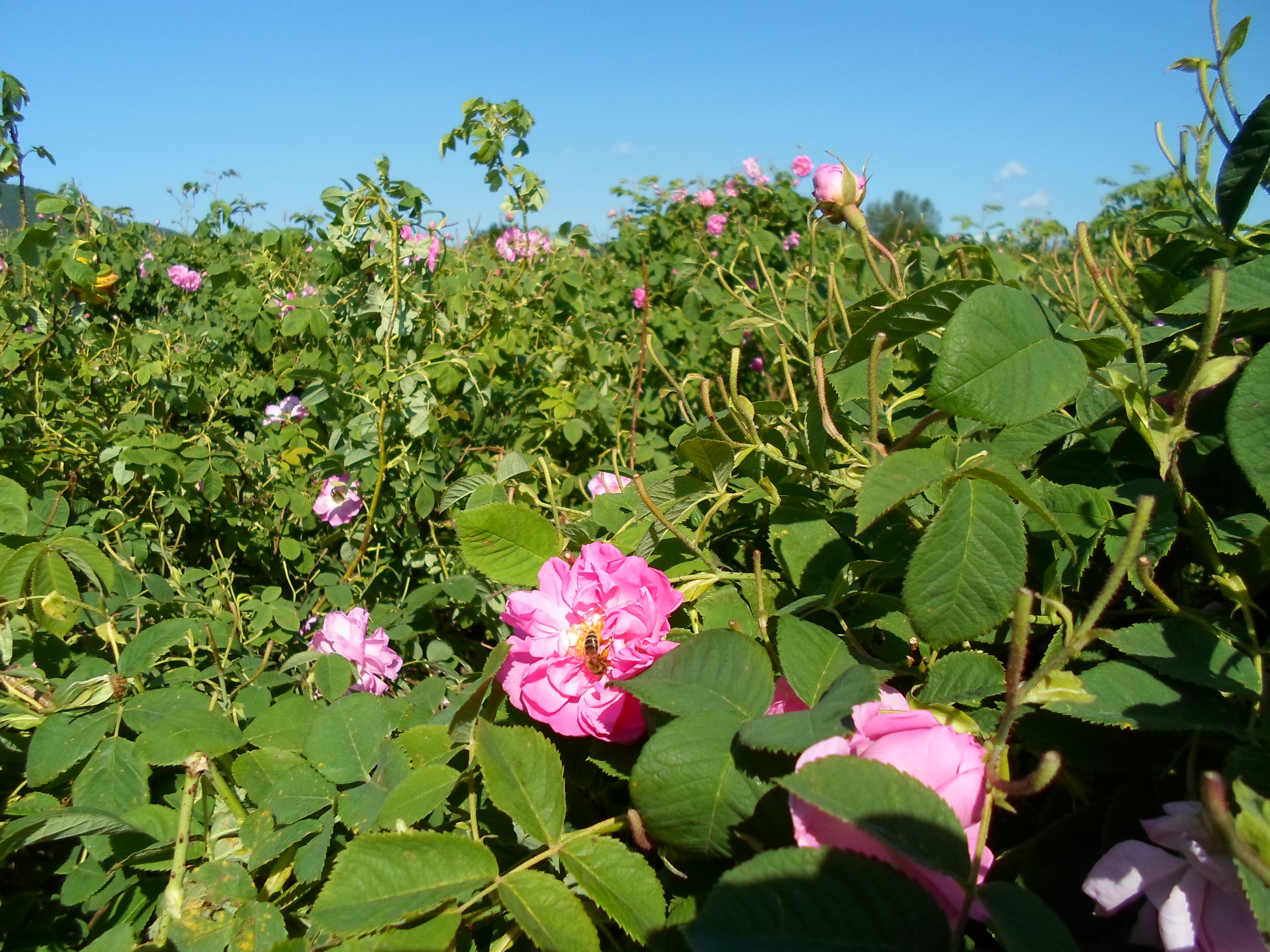 Рози в село Розово (област Стара Загора), 2014 г.